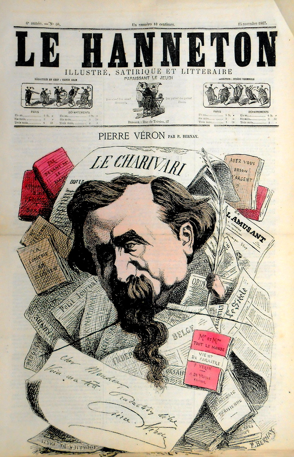 Le Hanneton n° 40 du 15 novembre 1867 : Pierre Véron (1831-1900), dessin de P. Bernay.